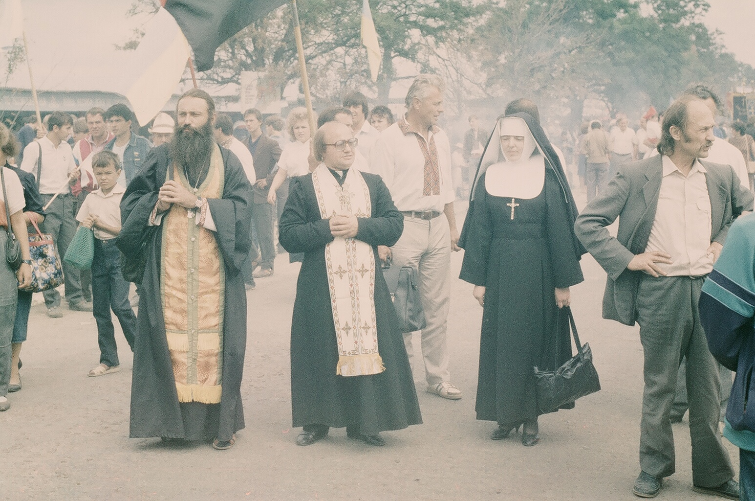 Духовенство: Фото